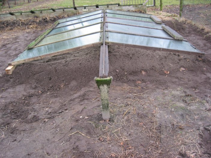 zelfgemaakte foto van dubbele broeibak; eind januari